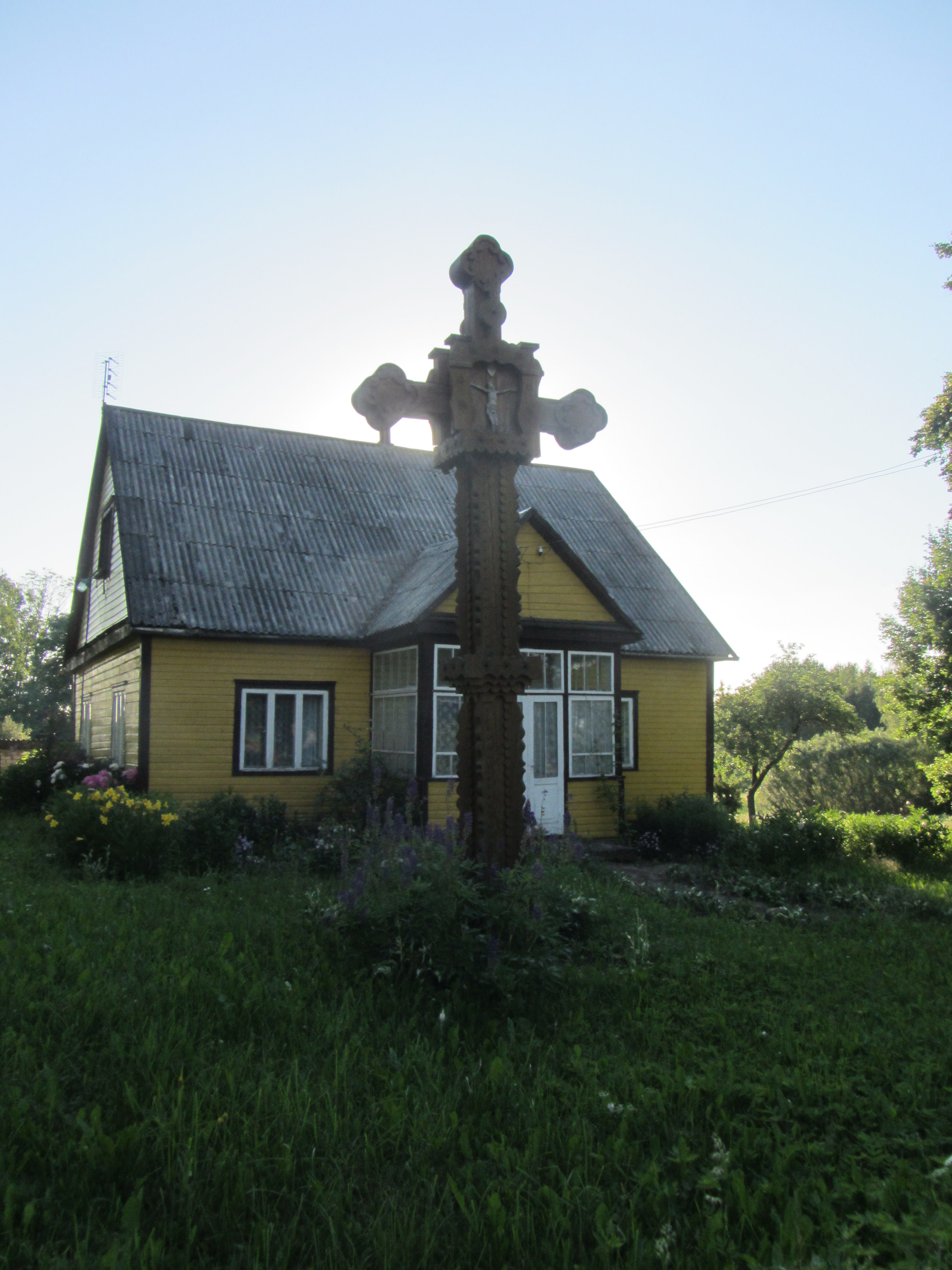 Skiemonių sen., Lithuania